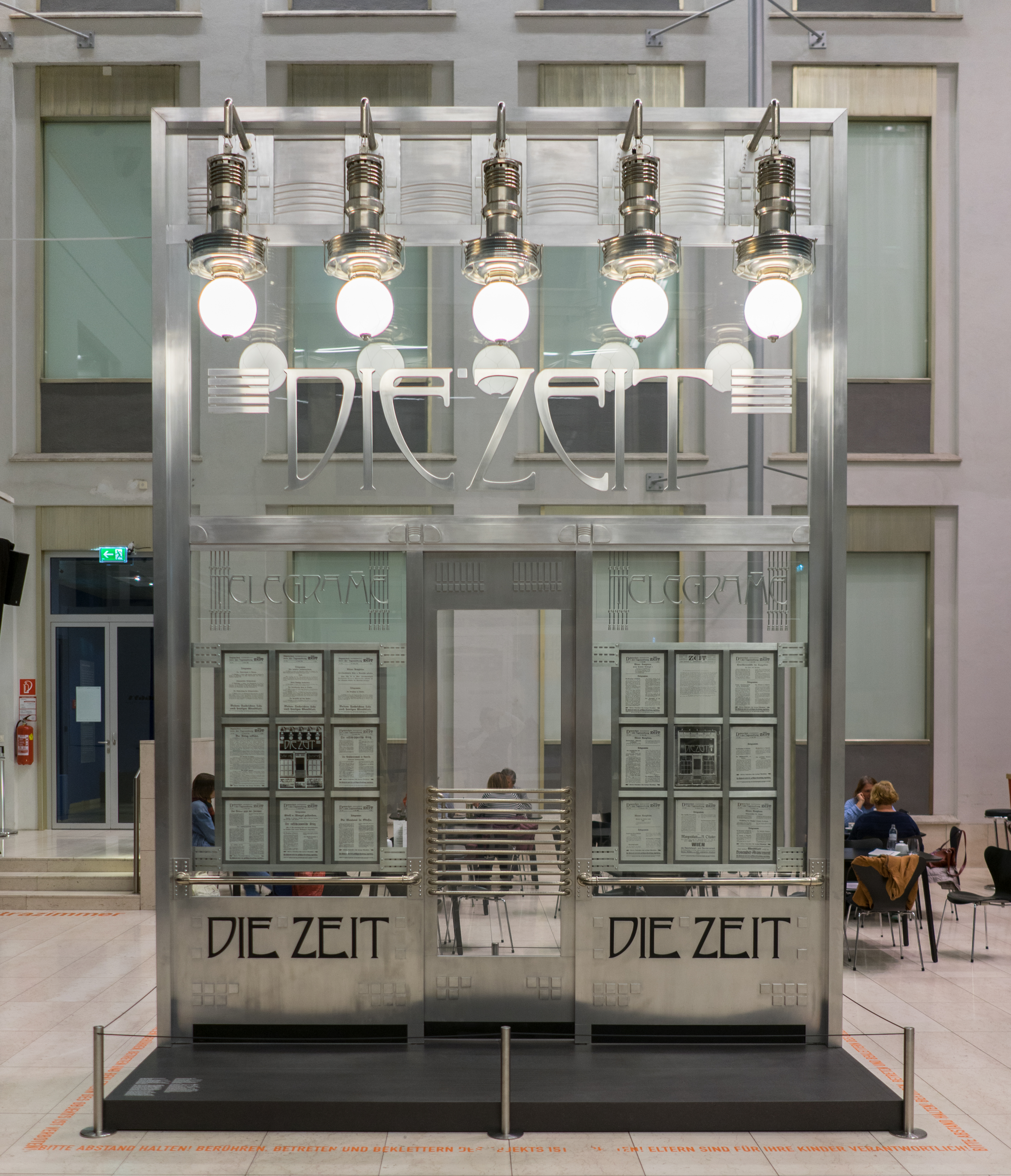 Wien, Depeschenbüro »Die Zeit«, Otto Wagner 1902. Rekonstruktion für die Ausstellung »Traum und Wirklichkeit« des Historischen Museums der Stadt Wien, 1985. Aktueller Standort im WIEN MUSEUM, Karlsplatz